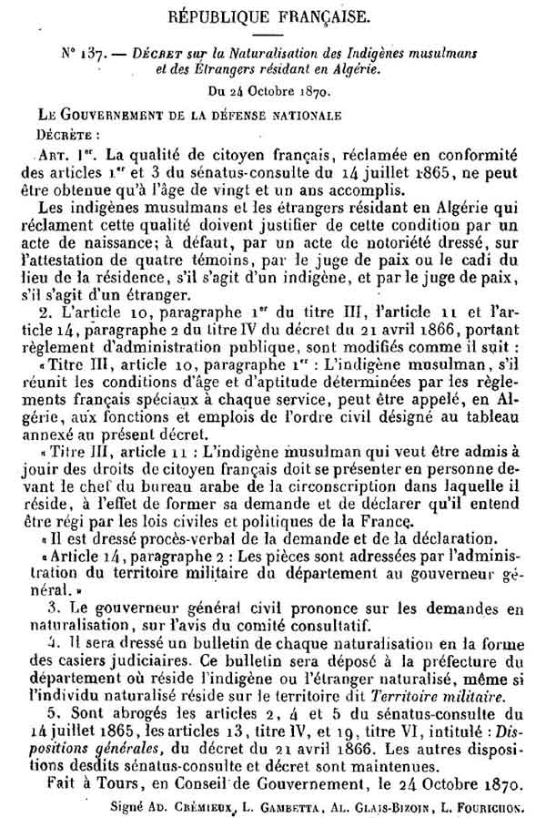 Décret Crémieux N° 137 Photocopie du Bulletin des Lois de la République Française